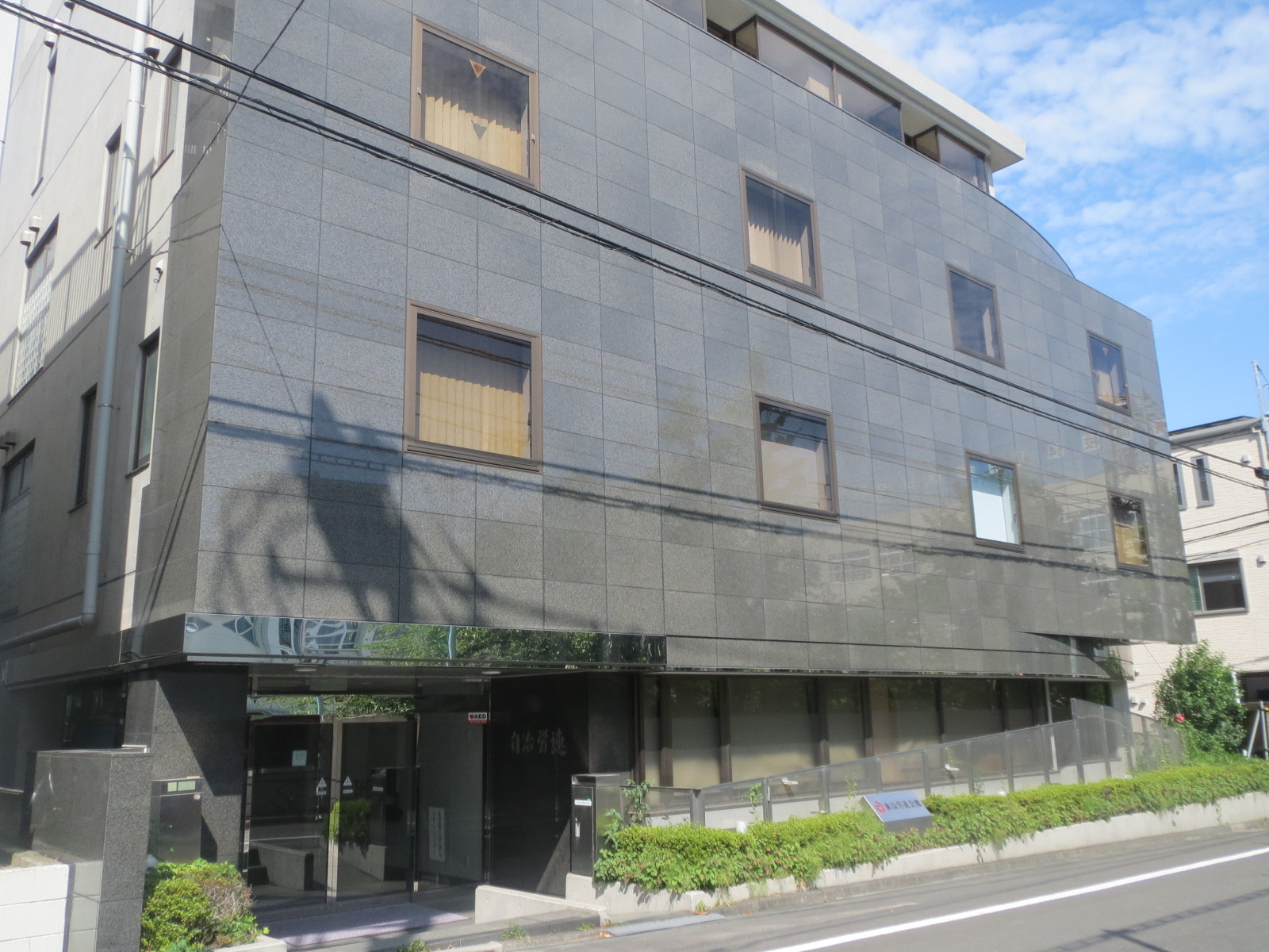 文京区にある自治労連会館